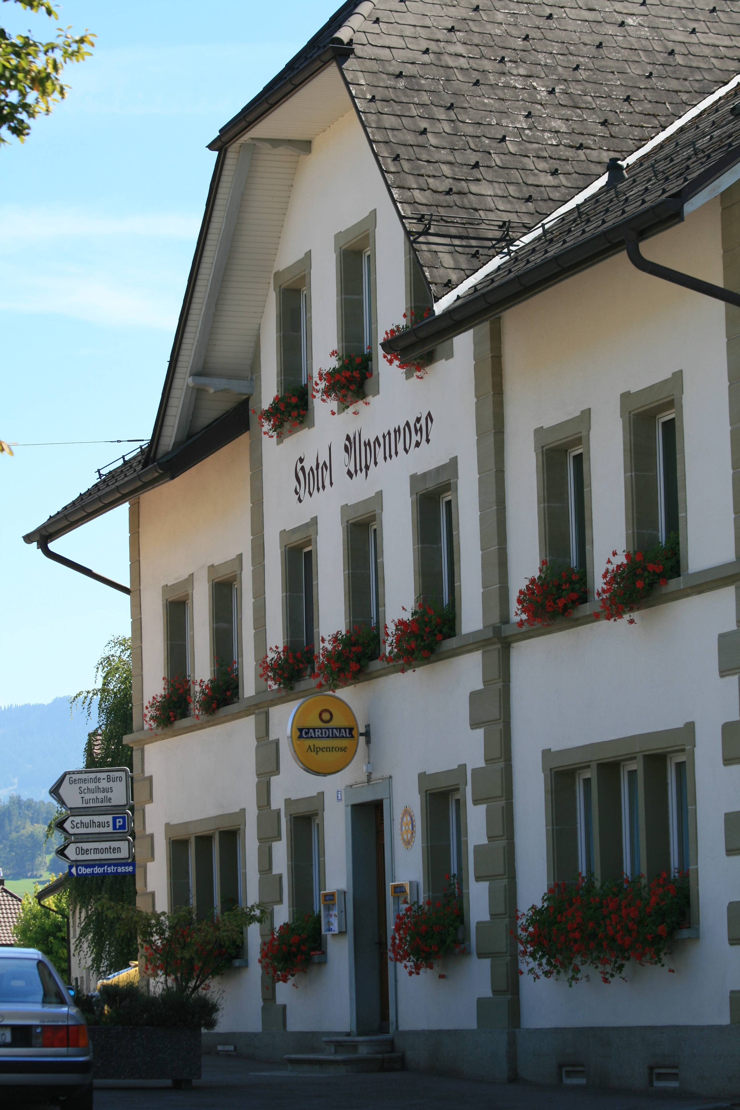 Hotel Alpenrose in Alterswil, Kanton Freiburg, Schweiz